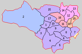 福島県西白河郡の町村。